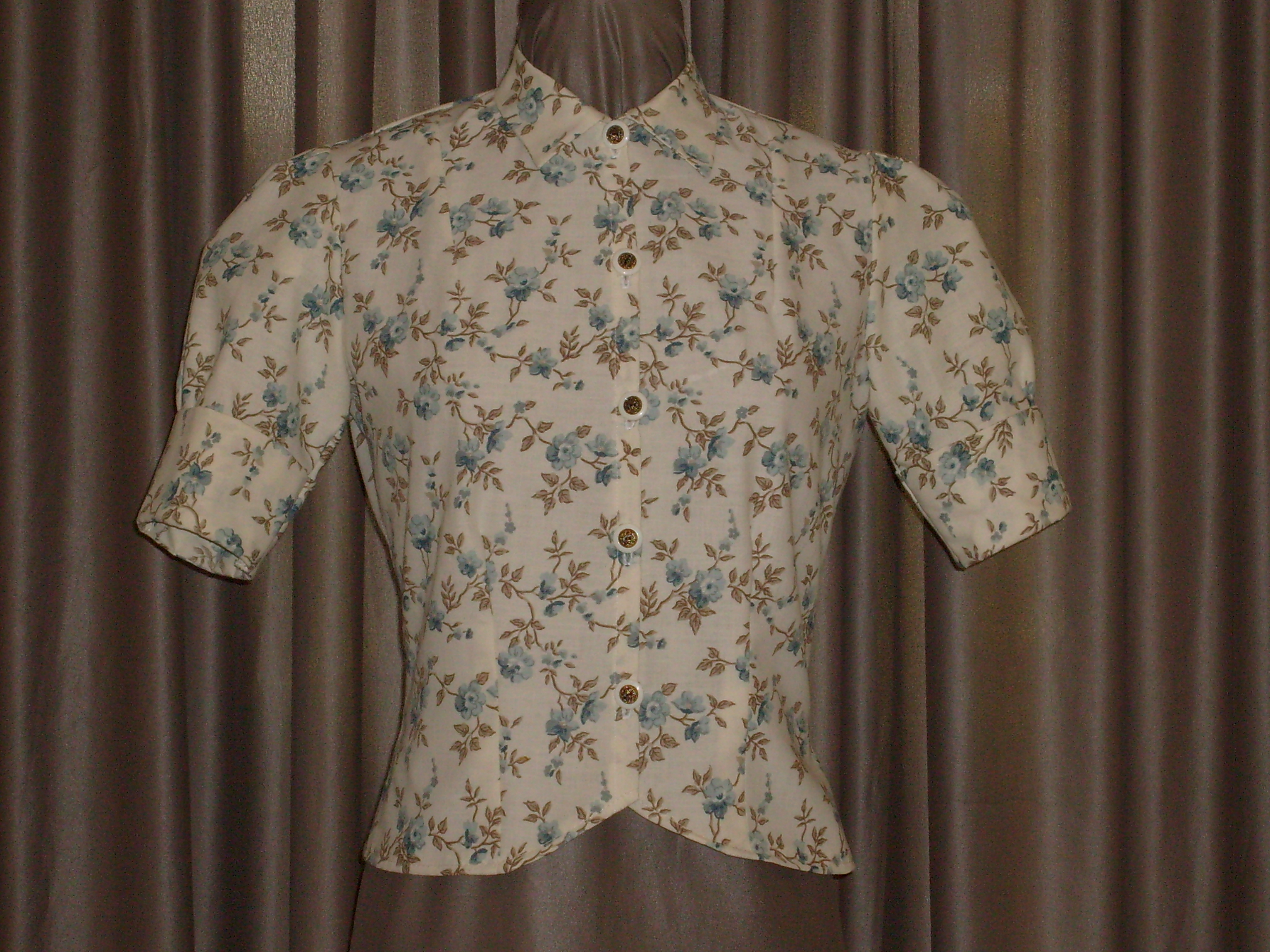 I stumbled across this fabric by chance in 2005. It just screamed 1940s to me. ++++++++++++++++++++++++++++++ Dieser Stoff war ein Zufallsfund, der foermlich nach verarbeitung zu einer Bluse aus den 1940er Jahren schrie.